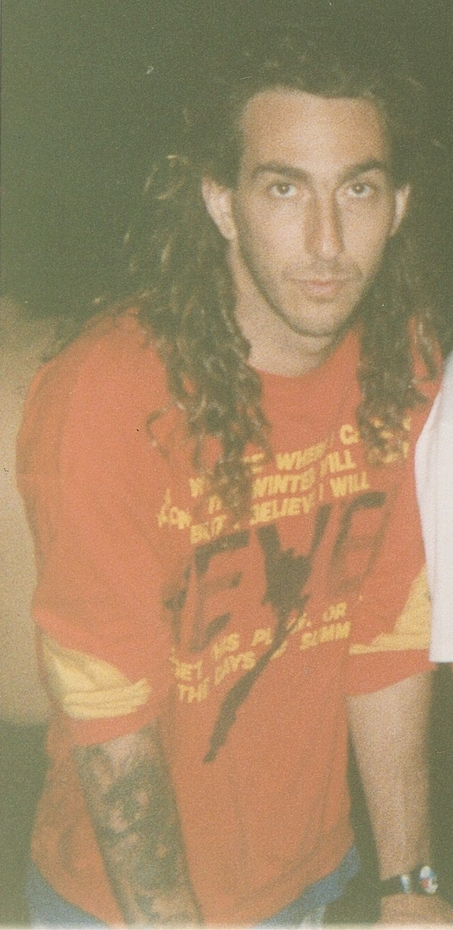 Sergio Berdichevsky en Posadas, Misiones, Argentina. Fotografía de Horacio Cambeiro.